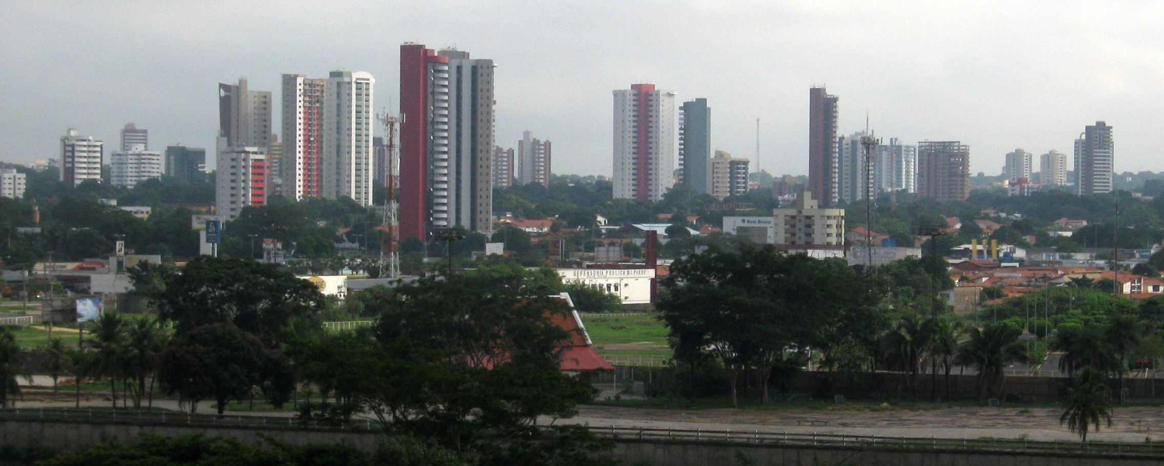 Teresina city, Piauí, Brazil